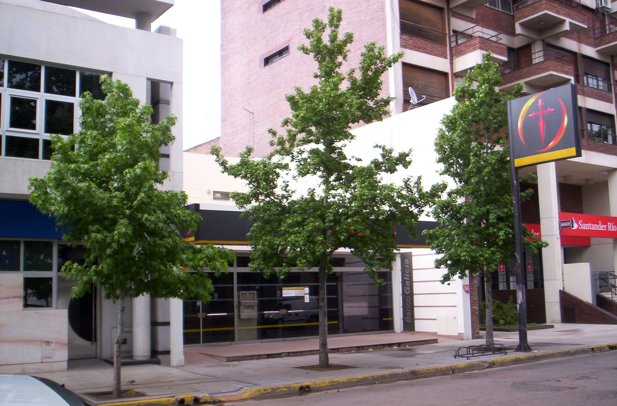 Banco Galicia de Junín, Argentina. Sucursal 97 ubicada en Lebensohn 27.